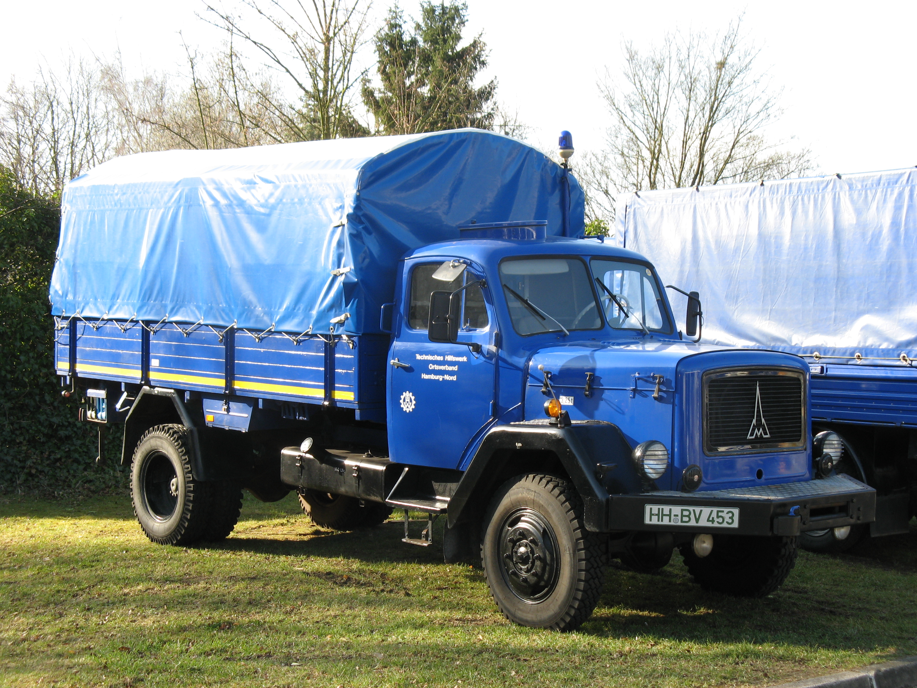 Klöckner-H-Deutz Mercur 120 AL eines Fördervereins des Technischen Hilfswerks Hamburg-Nord e.V.